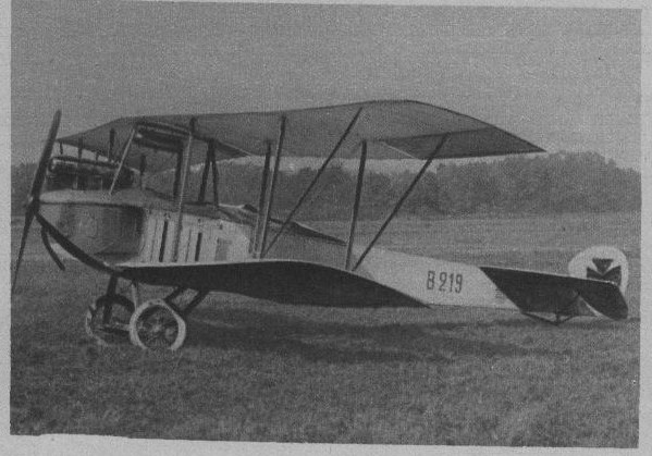 Aviatik B.I (P.14) abattu par l'aviateur fançais Benoit forcé de se poser à Rambervillers, l'avion fut exposé à Epinal.